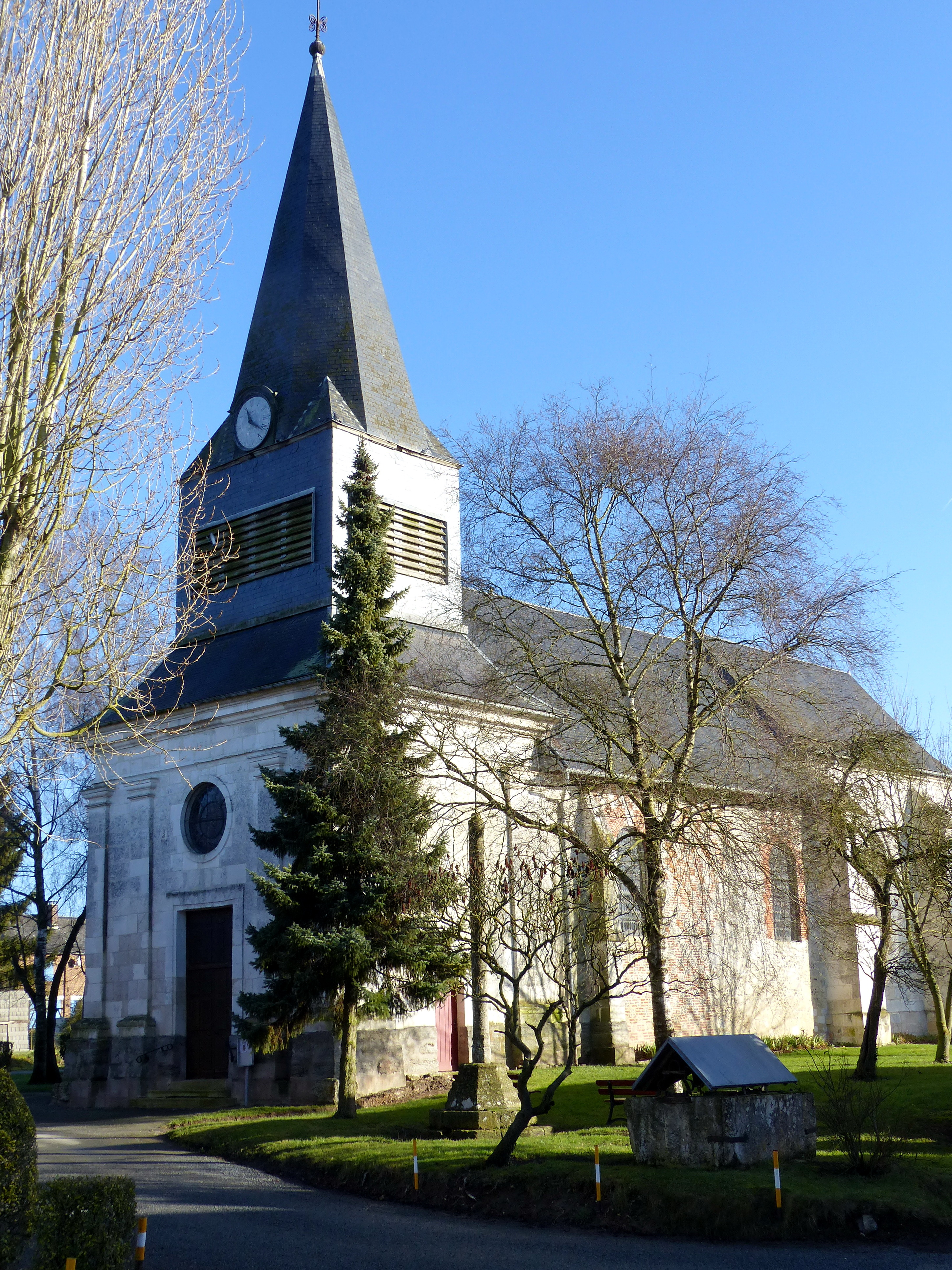 Vue de trois-quart de l'église Saint-Eloi d'Auchy-la-Montagne